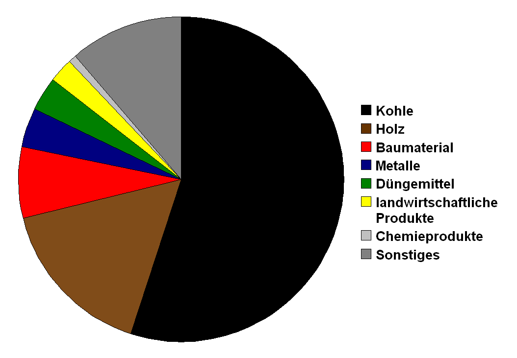 Ringdiagramm des Transportvolumens der Schmalspurbahn Wilkau-Haßlau–Carlsfeld 1964